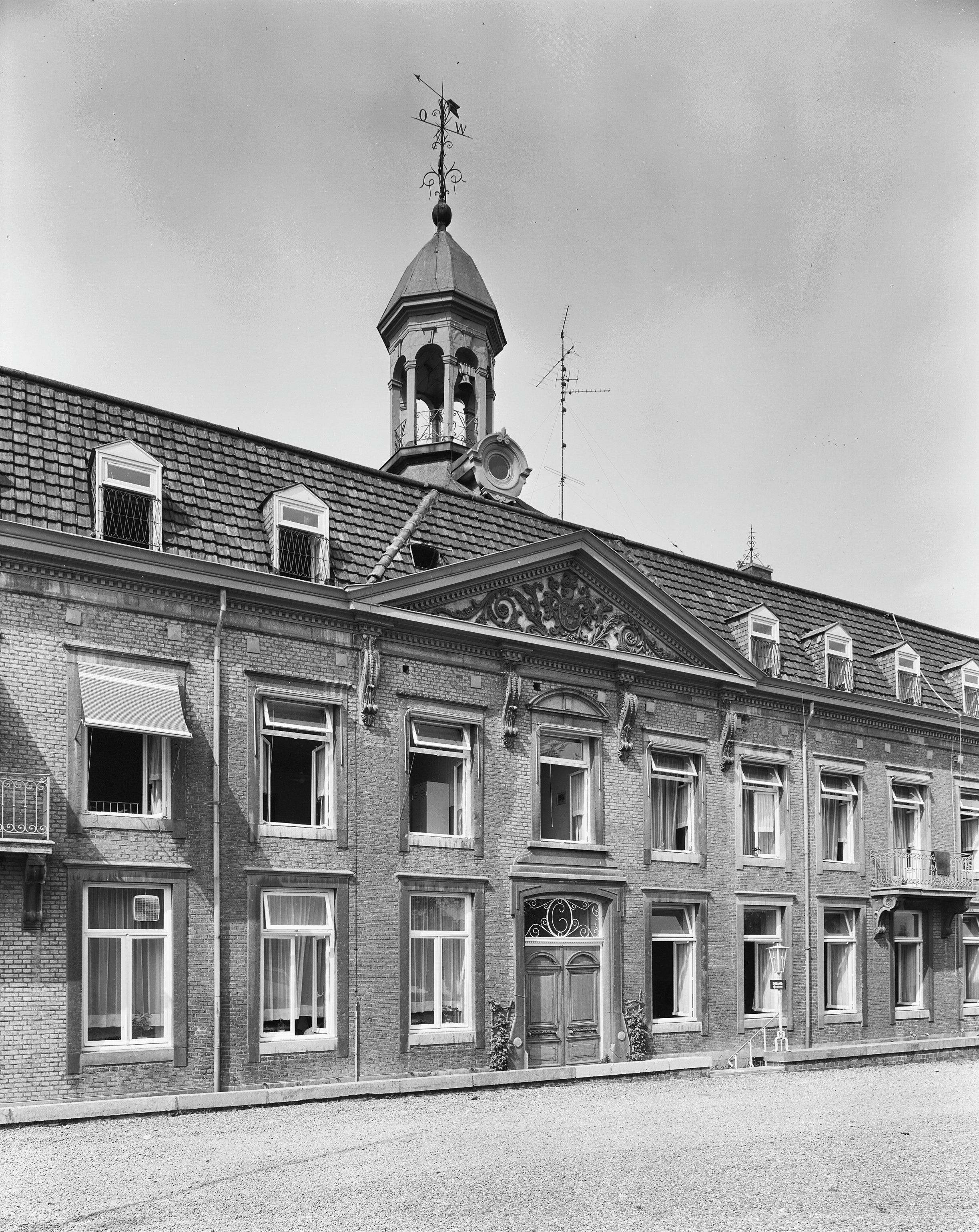 Voormalig Kasteel: voorgevel